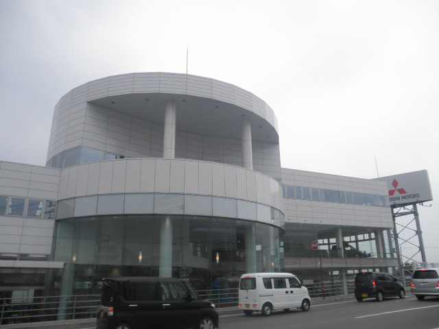 徳島三菱自動車 カーセブン徳島論田店